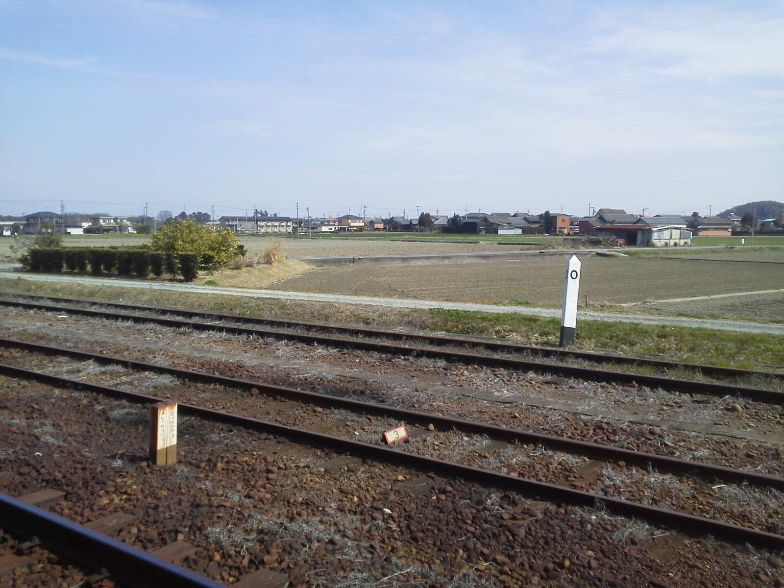 Sangu taki 0km